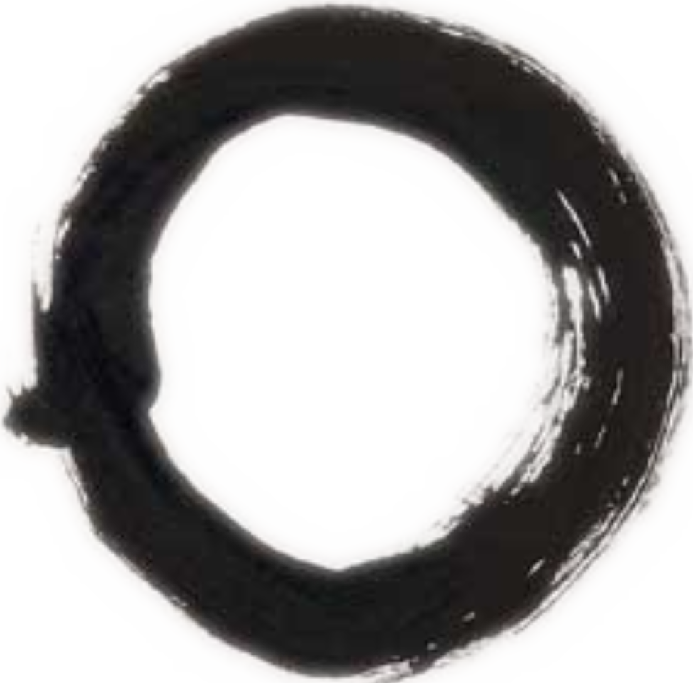 Enso